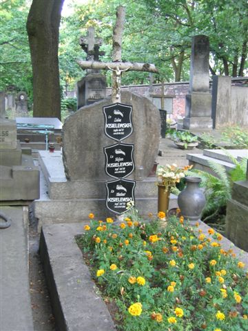 Stefan and Wacław Kisielewski's monument (Powązki Cemetery)